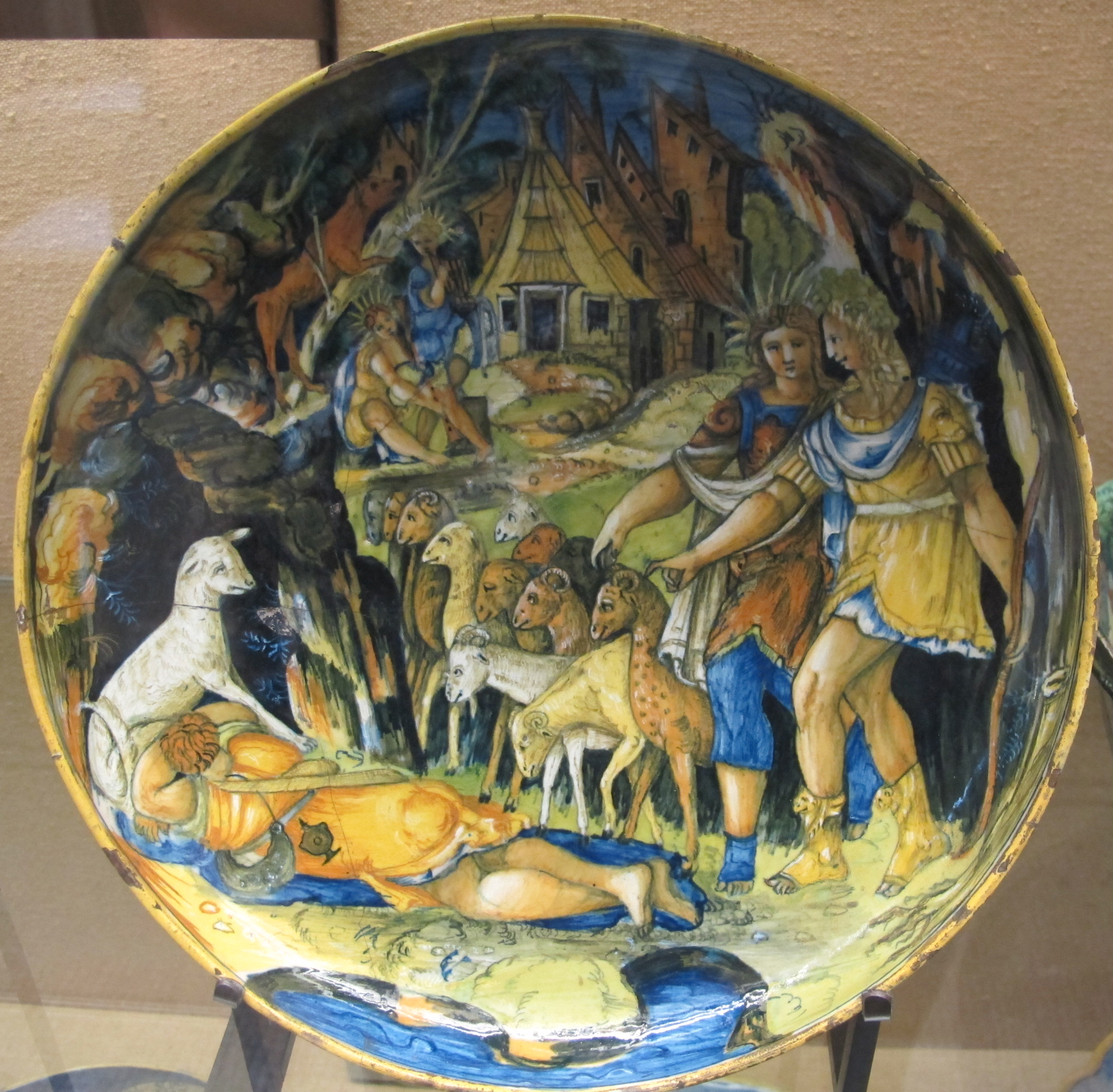 Urbino, apollo e admeto, 1550 ca.